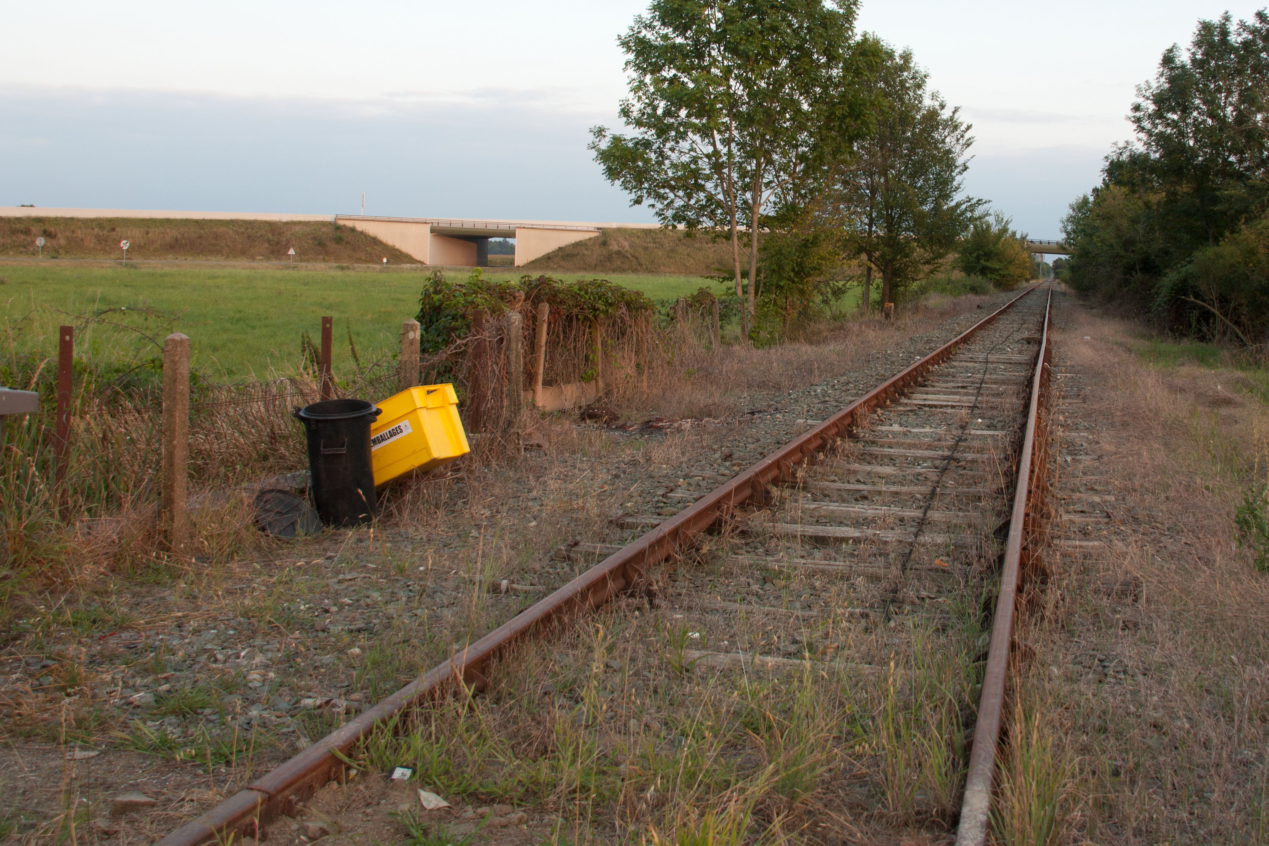 Ligne de Morcenx à Bagnères-de-Bigorre / PN 77 à Sombrun / Hautes-Pyrénées / France